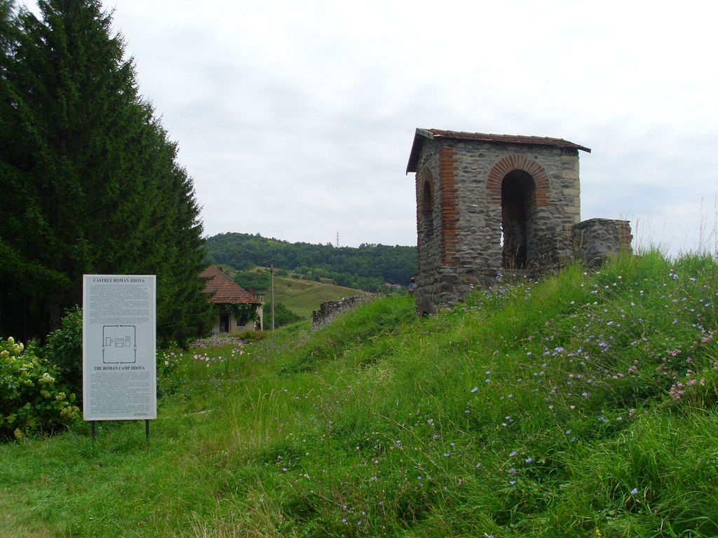 Castrul Roman Jidova 01